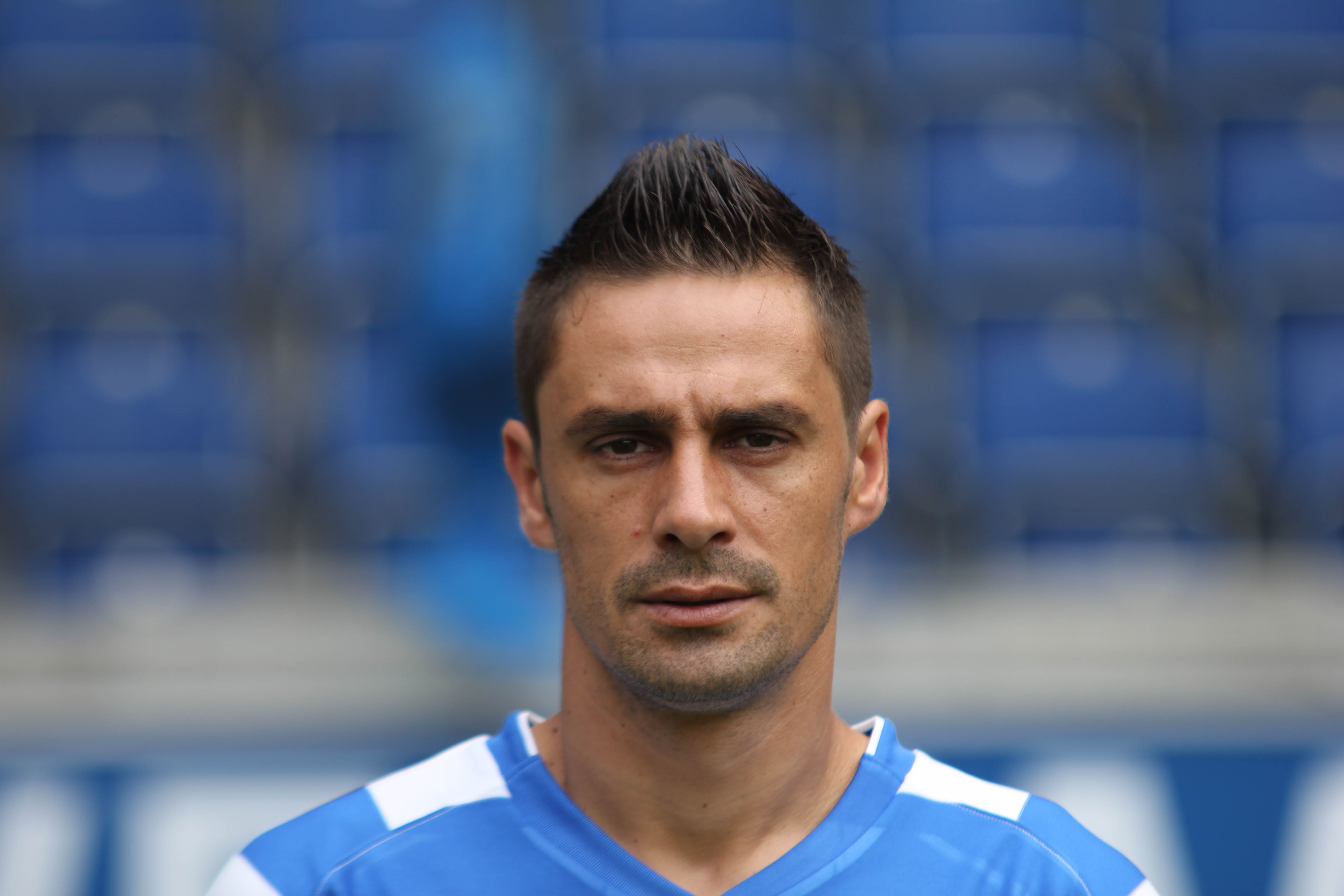 Bosnian footballer Džemal Berberović, MSV Duisburg